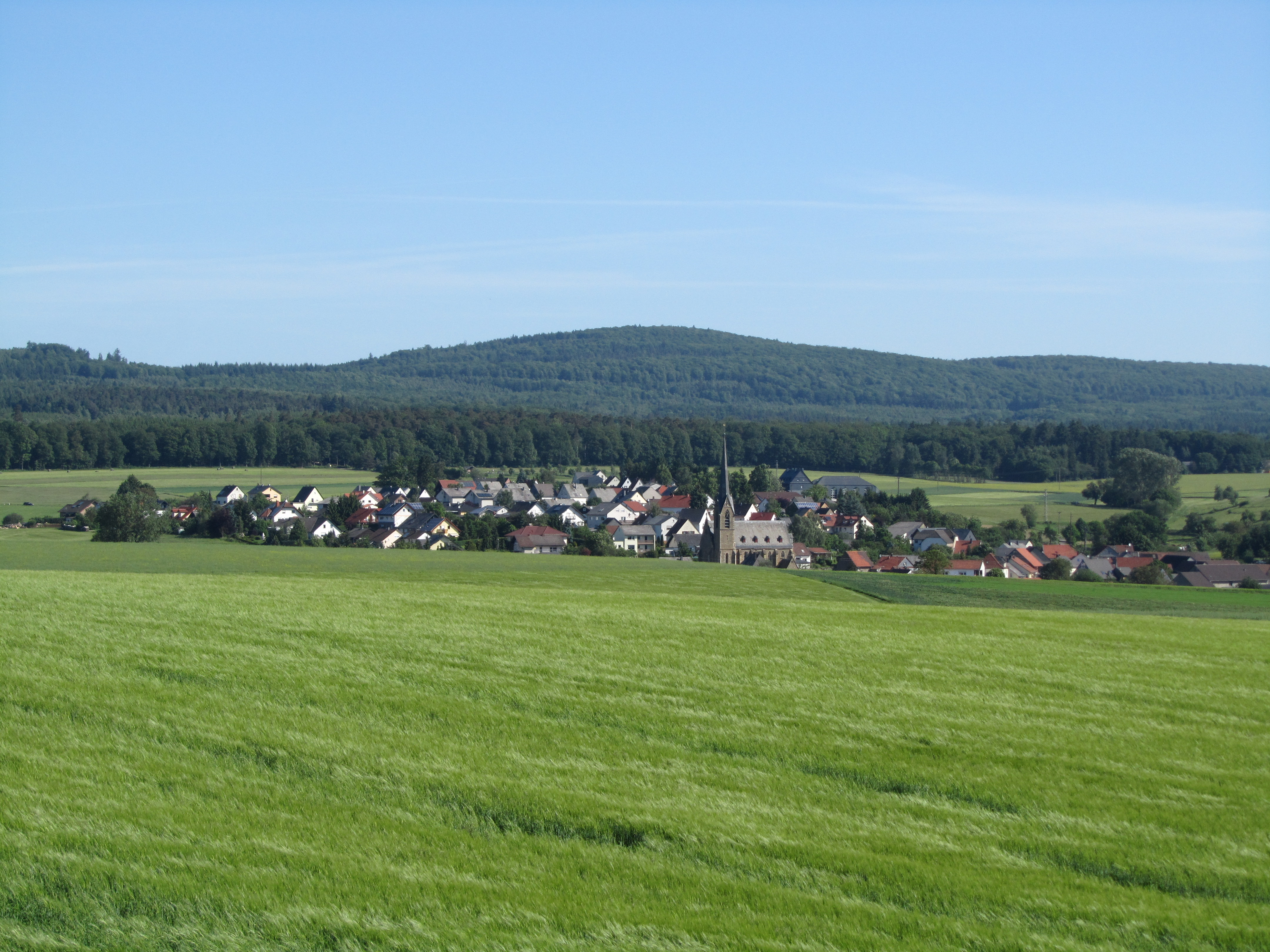 Der Berg Alteburg (620 m) im Soonwald (Hunsrück) von Süden. Im Vordergrund der Ort Seesbach